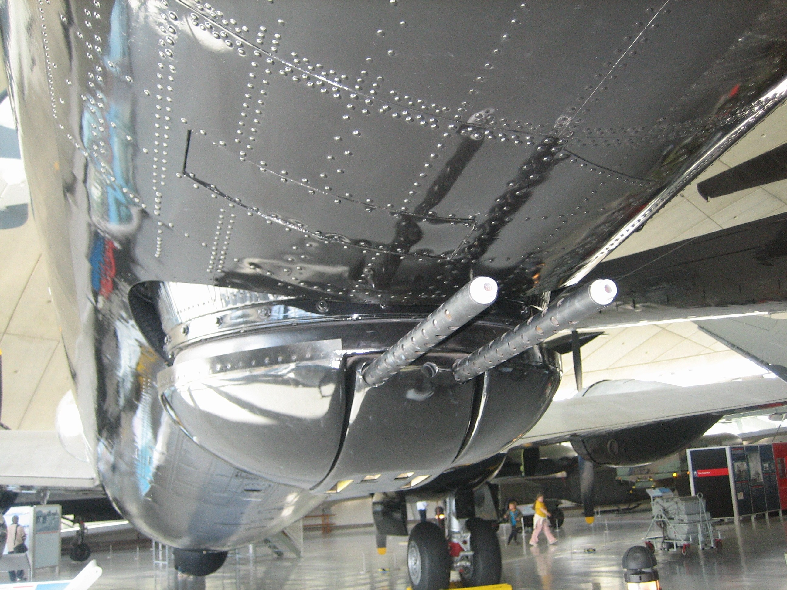 B-29 ventral turret